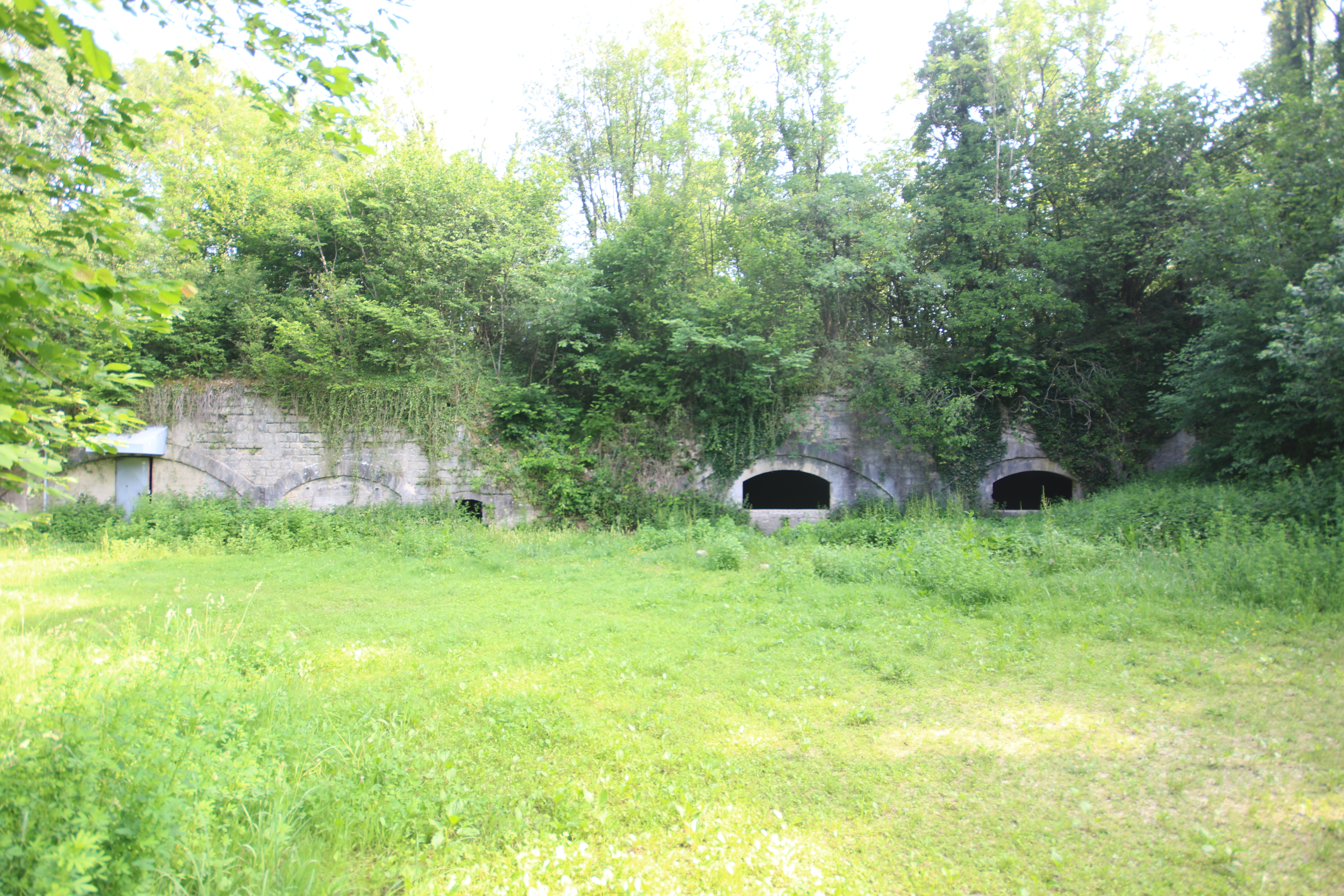 289A5127